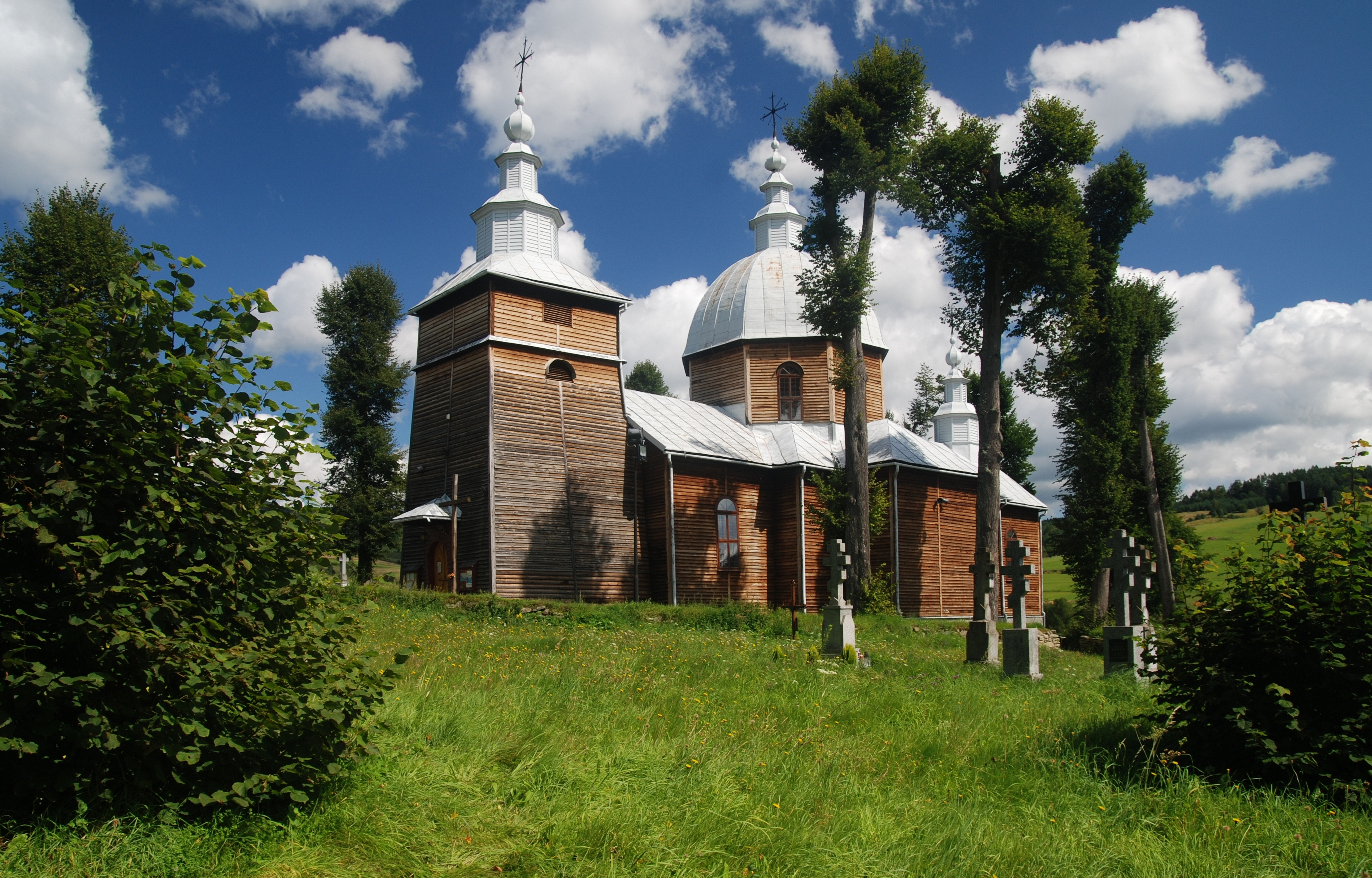 Złockie, cerkiew greko-kat. p.w. św. Dymitra, ob. kościół rzym.-kat. par., 1873